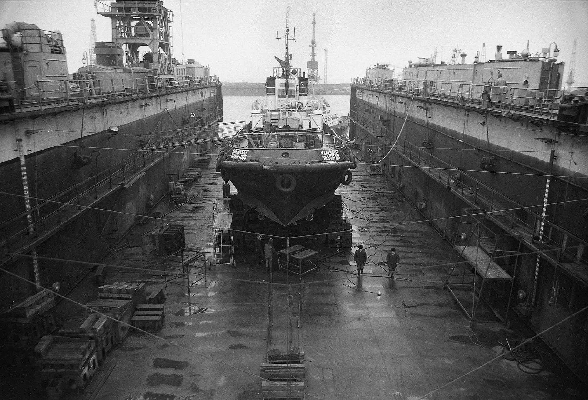 Ujuvdokk (dokis puksiir Kalevipoeg) Tallinnas Paljassaare sadamas 88